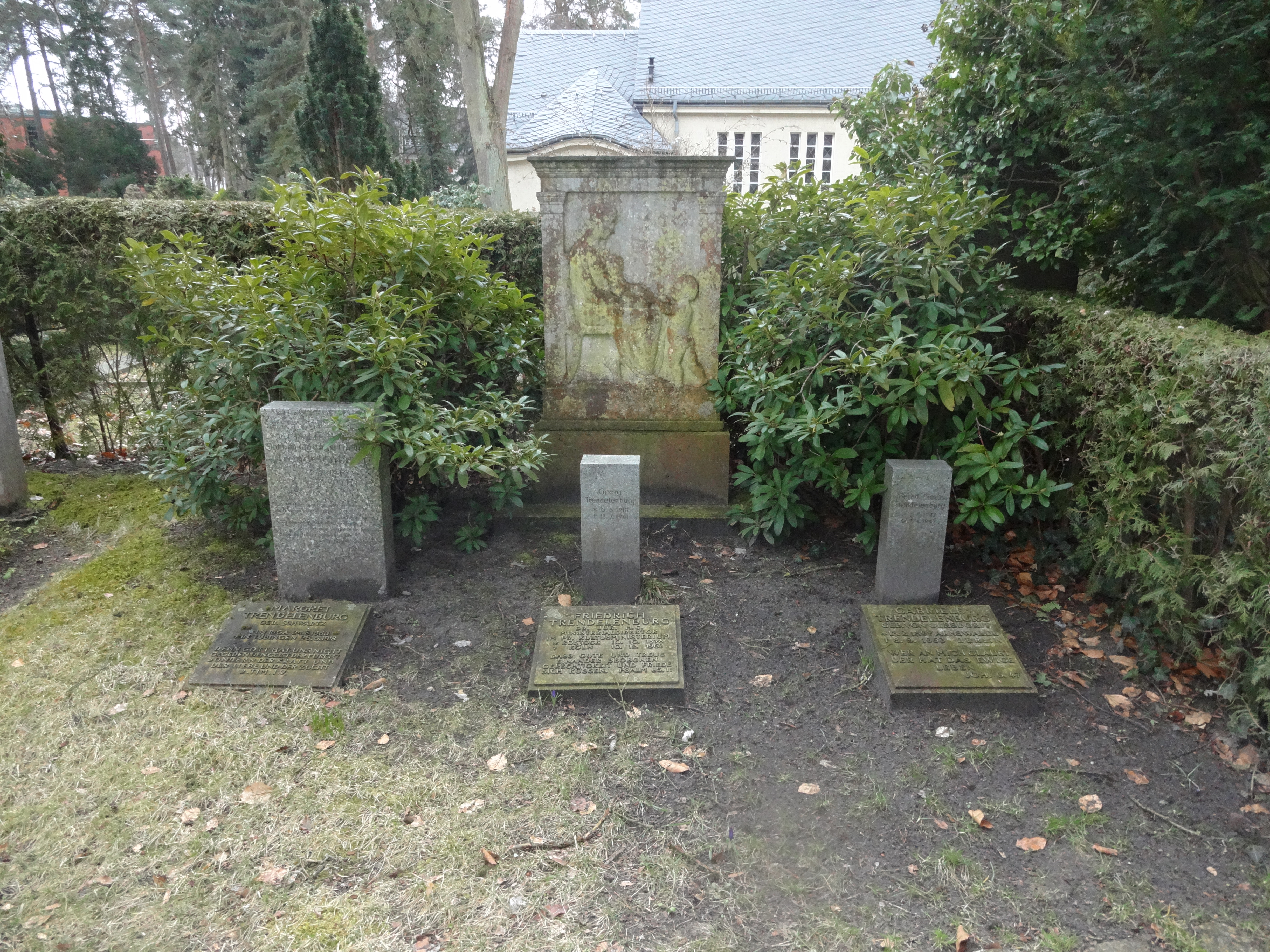 Grabstätte Familie Trendelenburg (unter anderem Friedrich Trendelenburg auf dem Evangelischen Kirchhof Nikolassee in Berlin